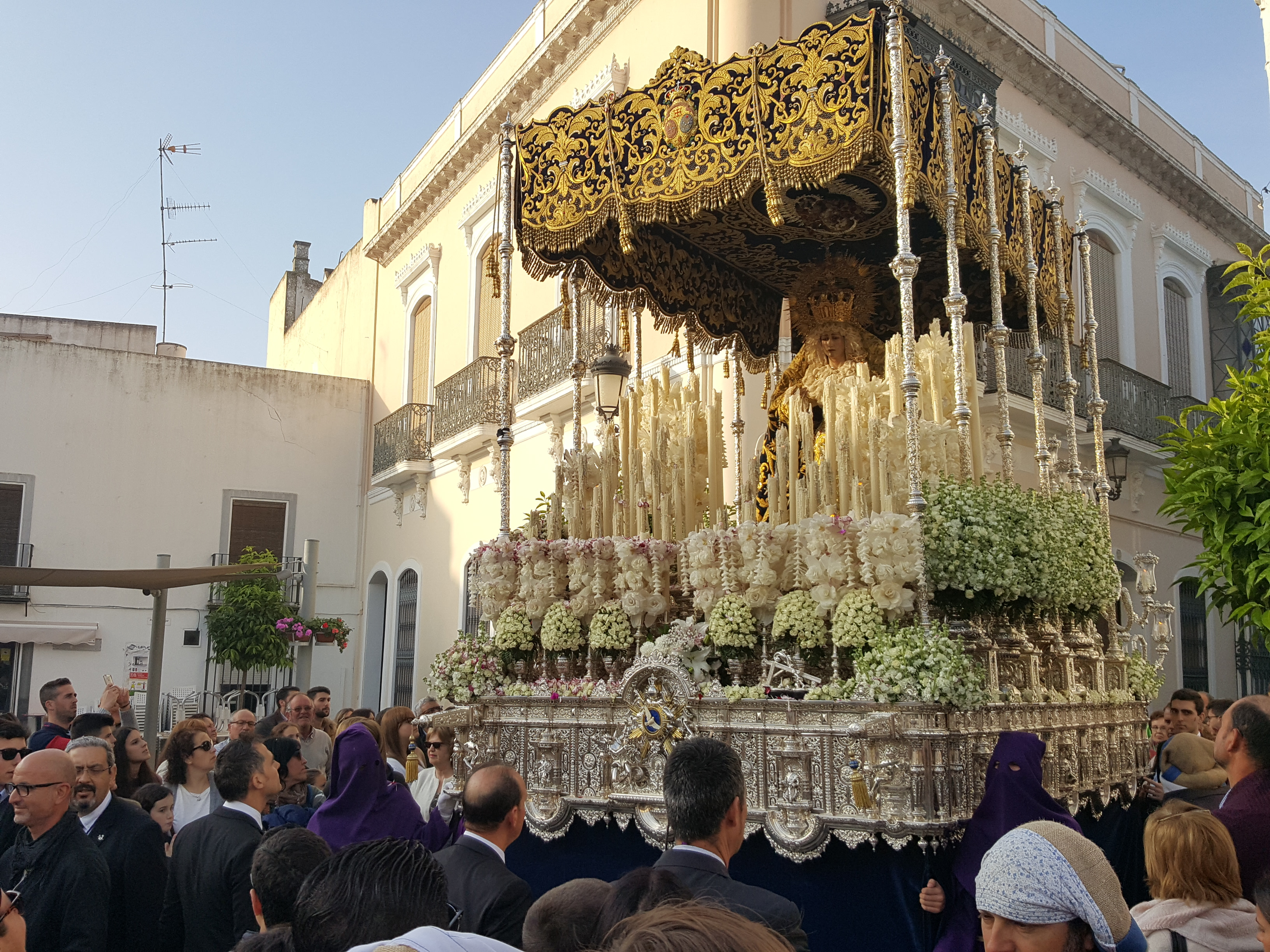 Hermandad de la Padre Jesús. Desfile procesional del Viernes Santo madrugada. Vista del paso de la Virgen de los Dolores por el casco urbano de Moguer.